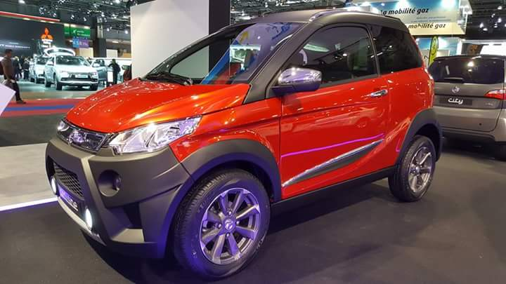 Crossline Aixam 2017